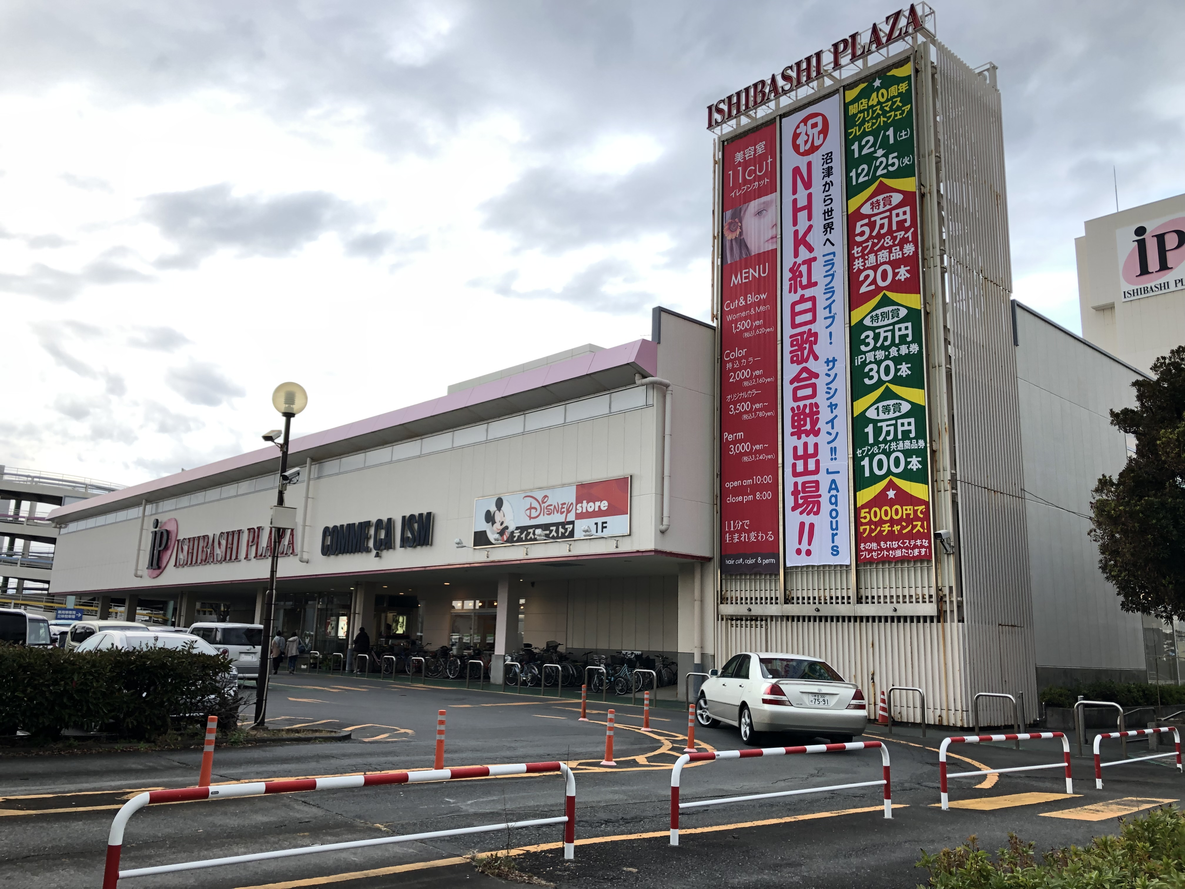 イシバシプラザ（静岡県ja:沼津市）